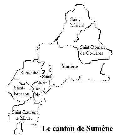 Le canton de Sumène Image personnelle